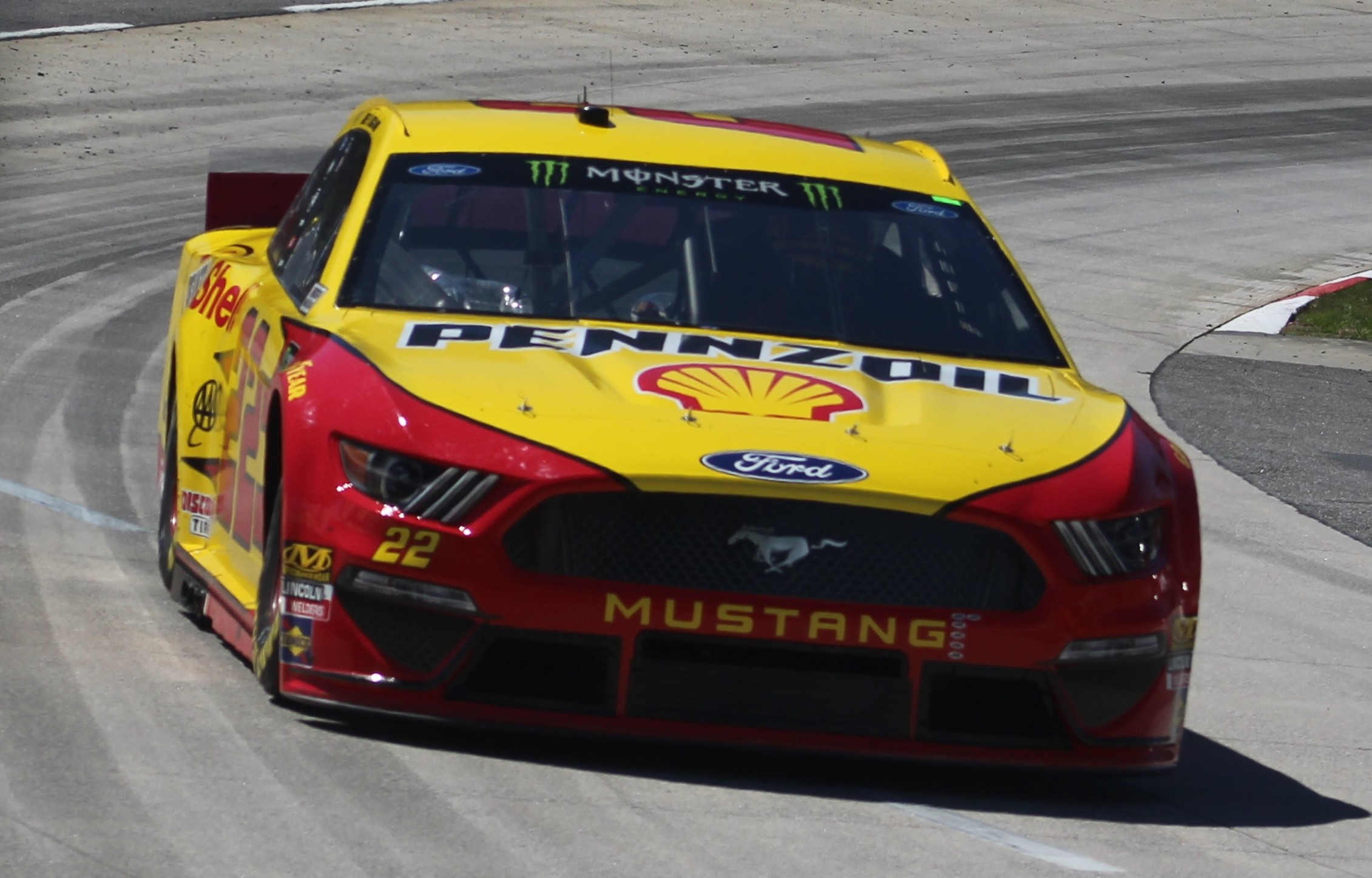 2019 STP 500